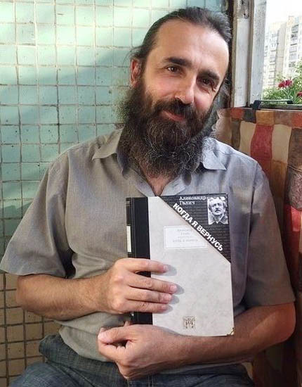 Сын А. Галича Григорий со сборником стихов А. Галича "Когда я вернусь"